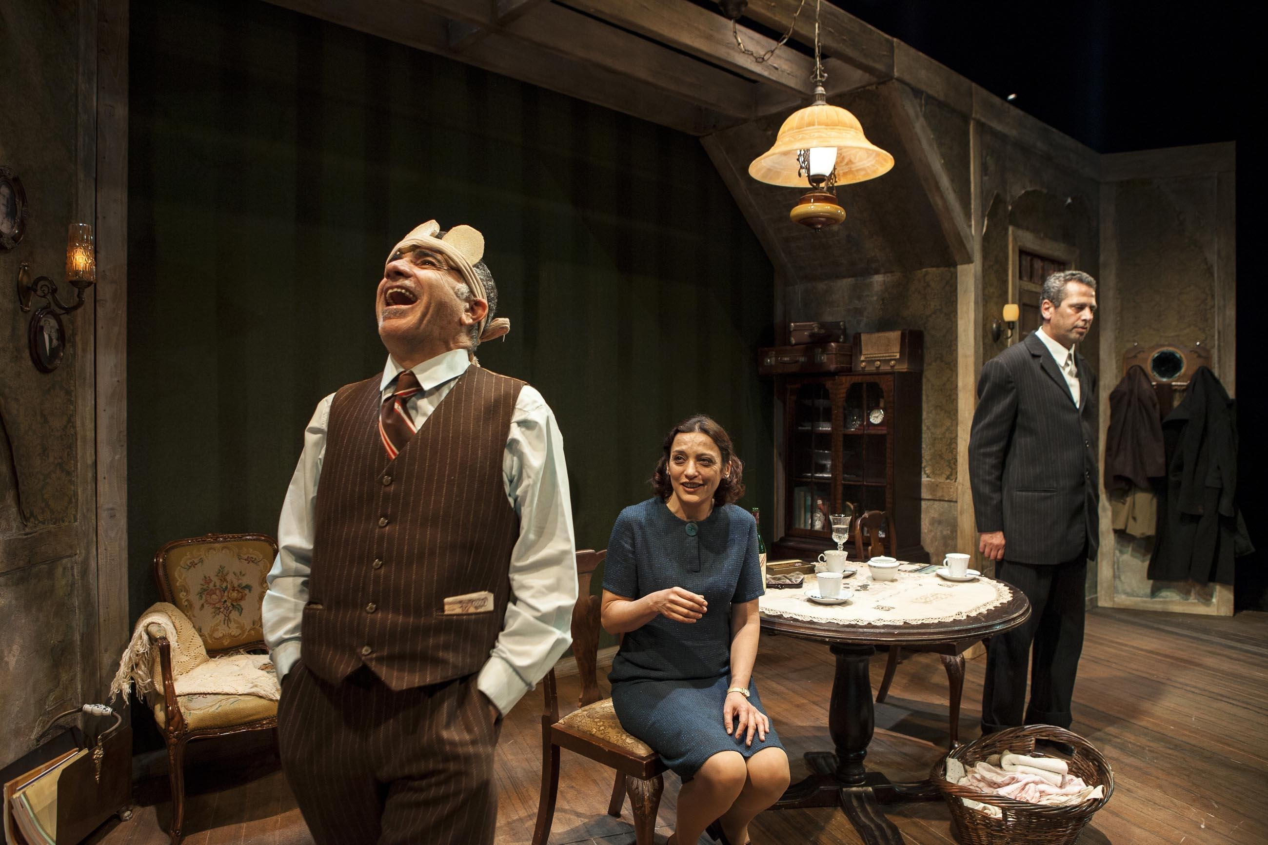 ח'ליפה נאטור, הלנה ירלובה ומשה איבגי בהצגה "אנשים קשים" מאת יוסף בר-יוסף, בבימויו של משה נאור, תיאטרון חיפה, 2012